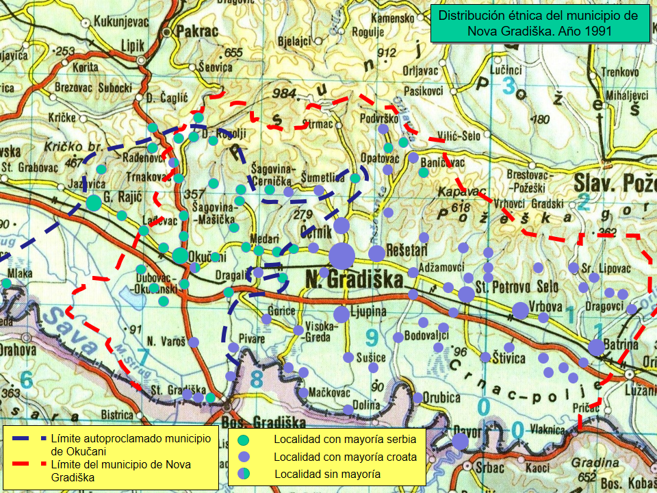 Límites y composición étnica del entonces Municipio de Nova Gradiška. Año 1991. Elaborado sobre la base de la información suministrada por [1]. Los límites fueron extraídos del documento del ICTY - Caso Slobodan Milošević: ACE17575R0000093798 (Map of Croatia showing the military lines as they correspond with the lines Gen Kadijevic outlines in his book)